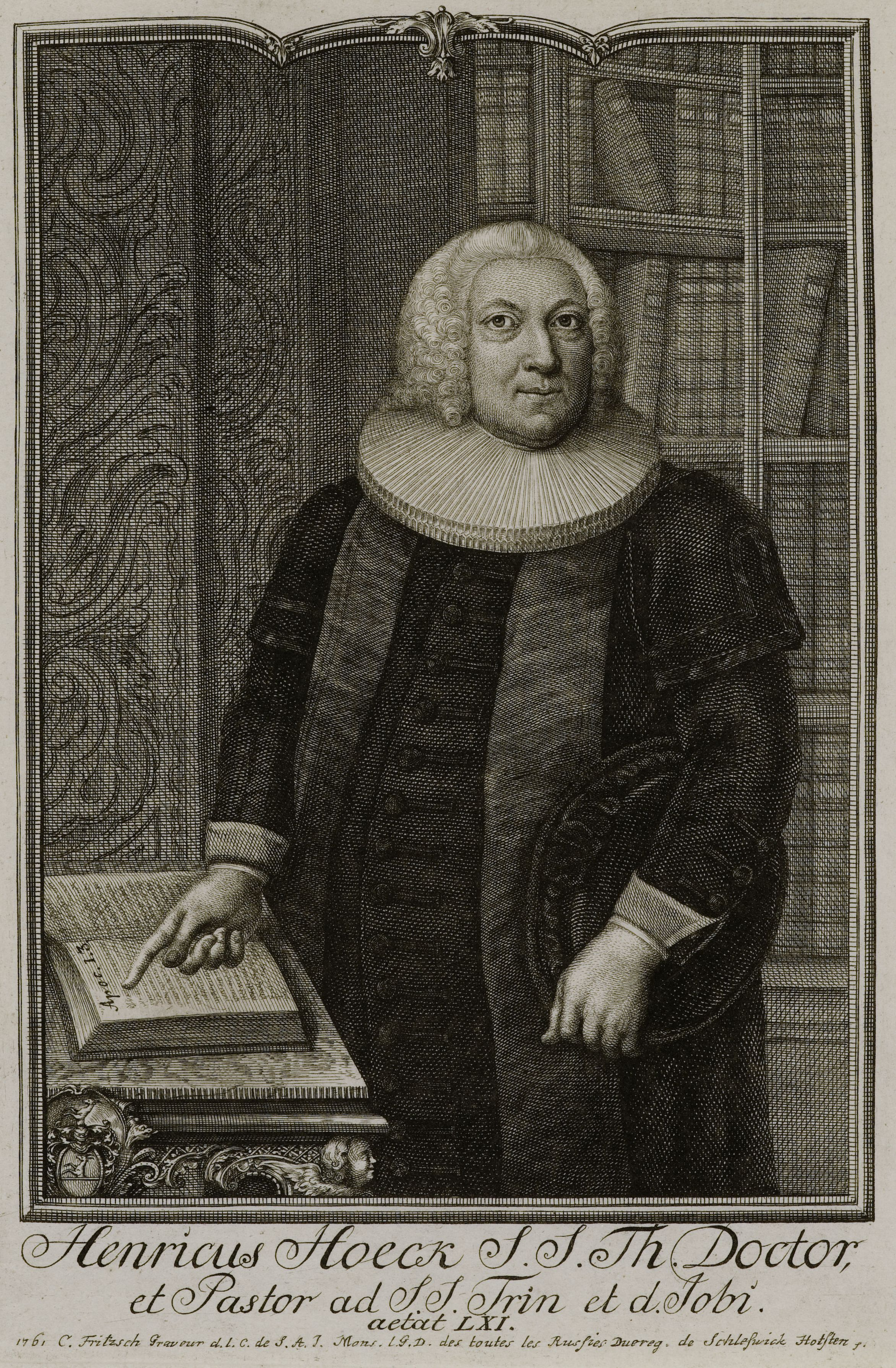 Henricus Hoeck S. S. Th. Doctor, et Pastor ad. S. S. Trin et d. Jobi